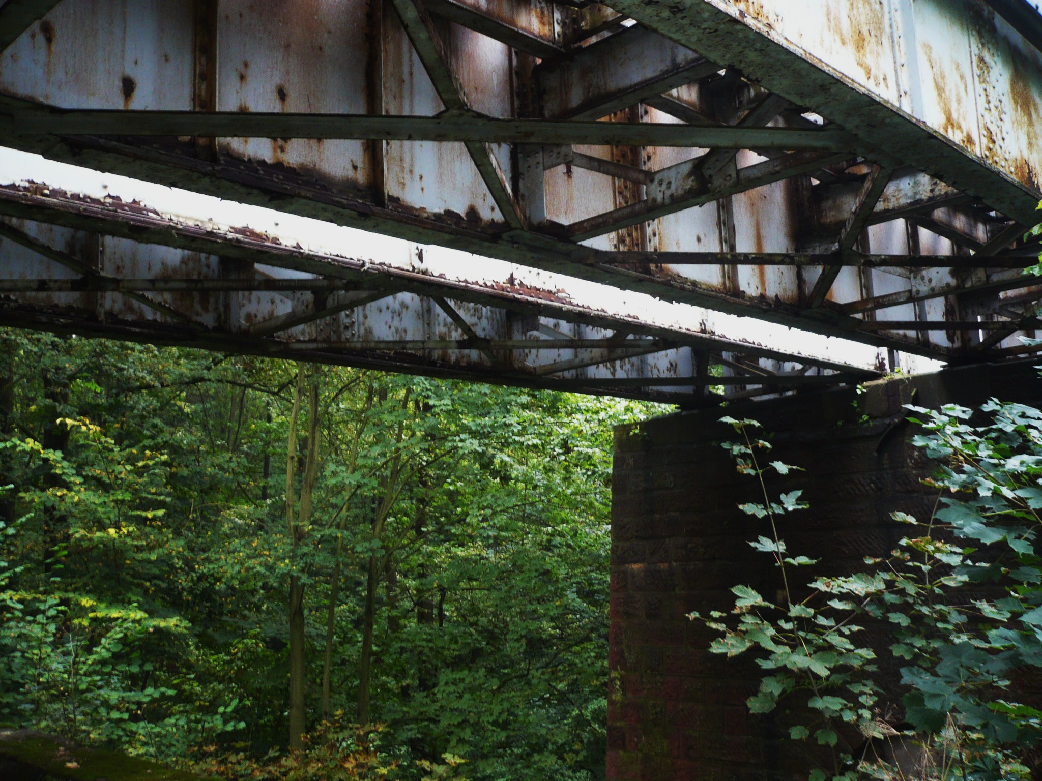 Włodowice.Wiadukt kolejowy